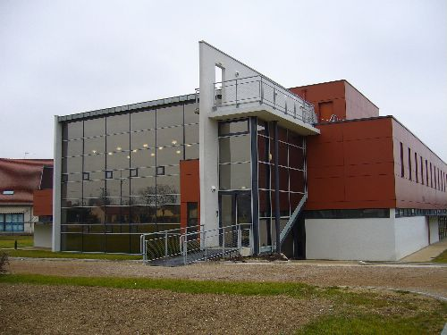 Saint-Germain (Aube)